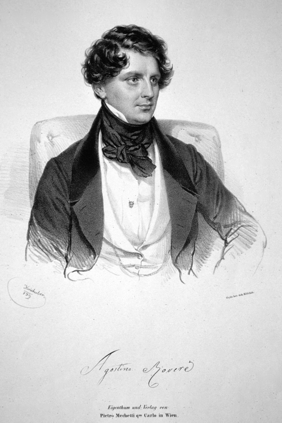 Agostino Rovere (1804-186 d5), italienischer Opernsänger (Bass), k. k. Hofopernsänger. Lithographie von Josef Kriehuber, 1839